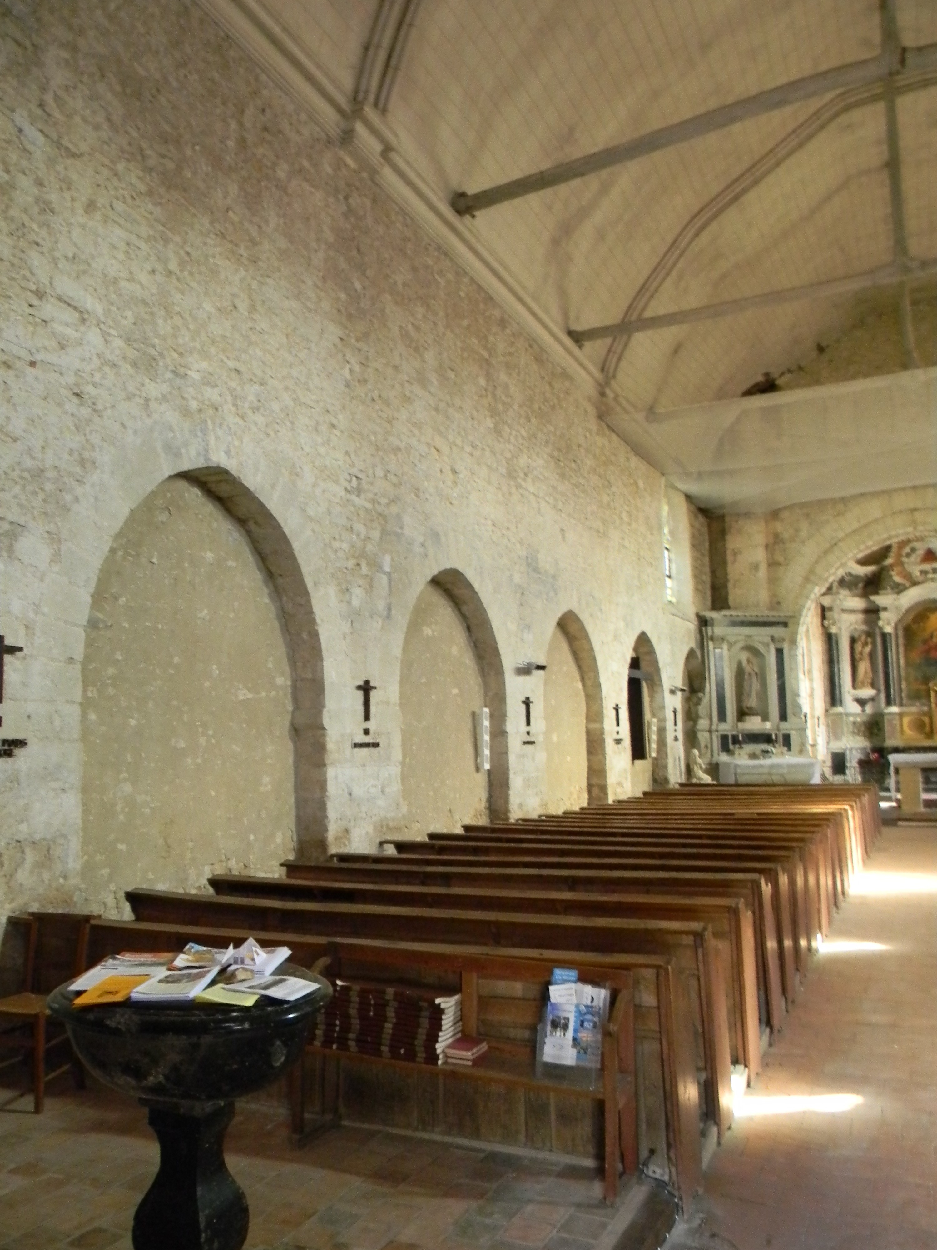 Eglise Notre Dame de Brissarthe. Mur Nord de la nef.